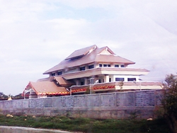 สำนักงานเทศบาลตำบลเมืองขุขันธ์